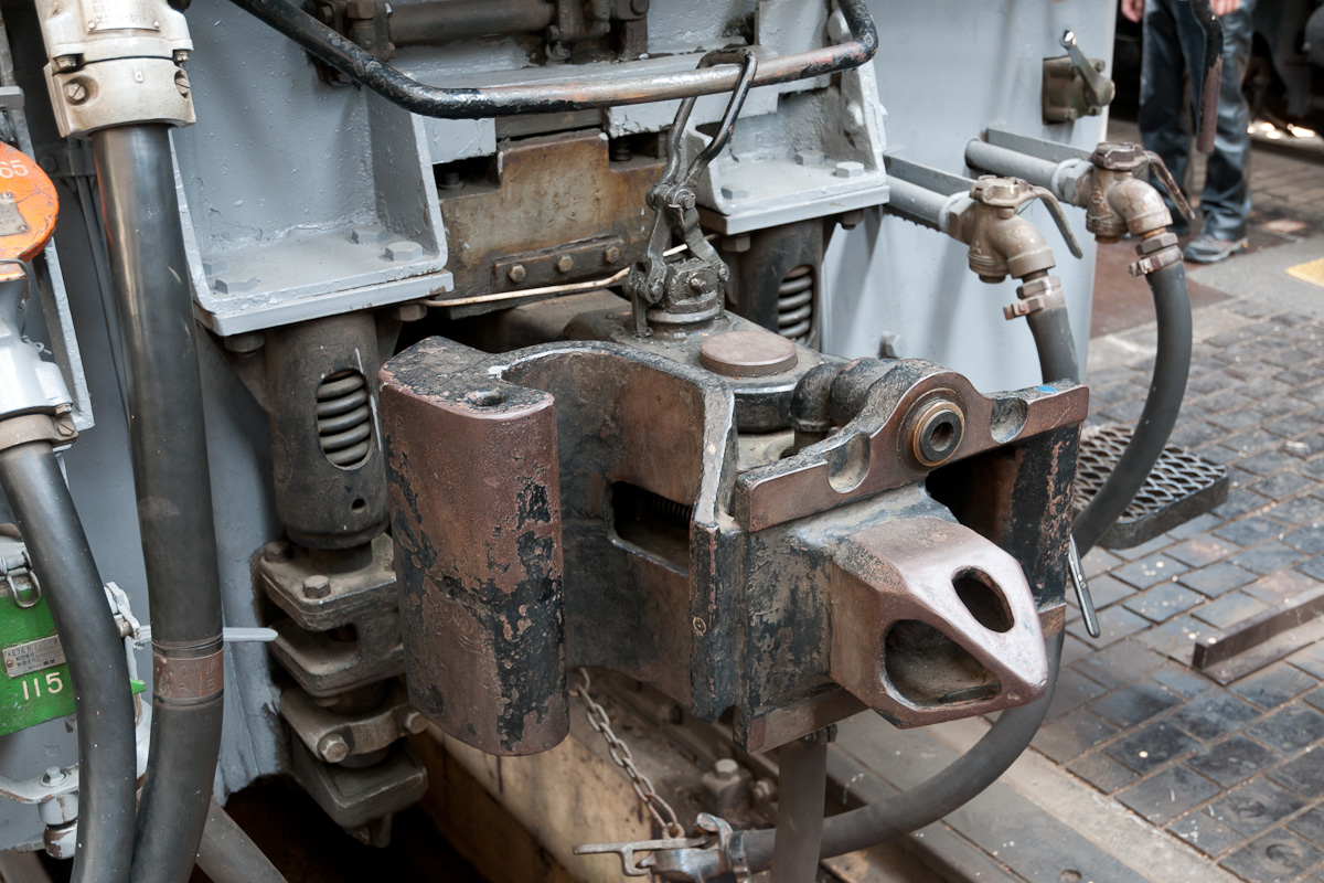 EF63形電気機関車の双頭連結器、碓氷鉄道文化むらの保存機。